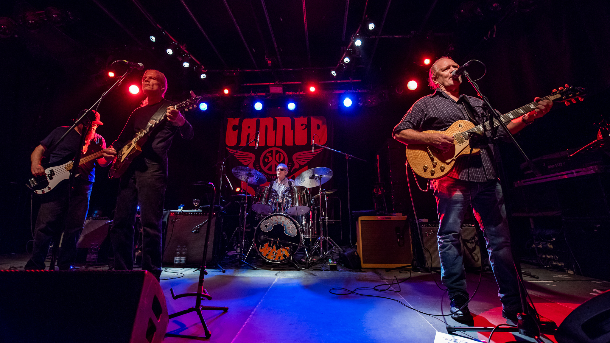 Adolfo „Fito“ de la Parra,Canned Heat,Concertbüro Franken,Dale Spalding,John Paulus,Konzert,Larry Taylor,Livekonzert,Livemusik,Musik,Serenadenhof